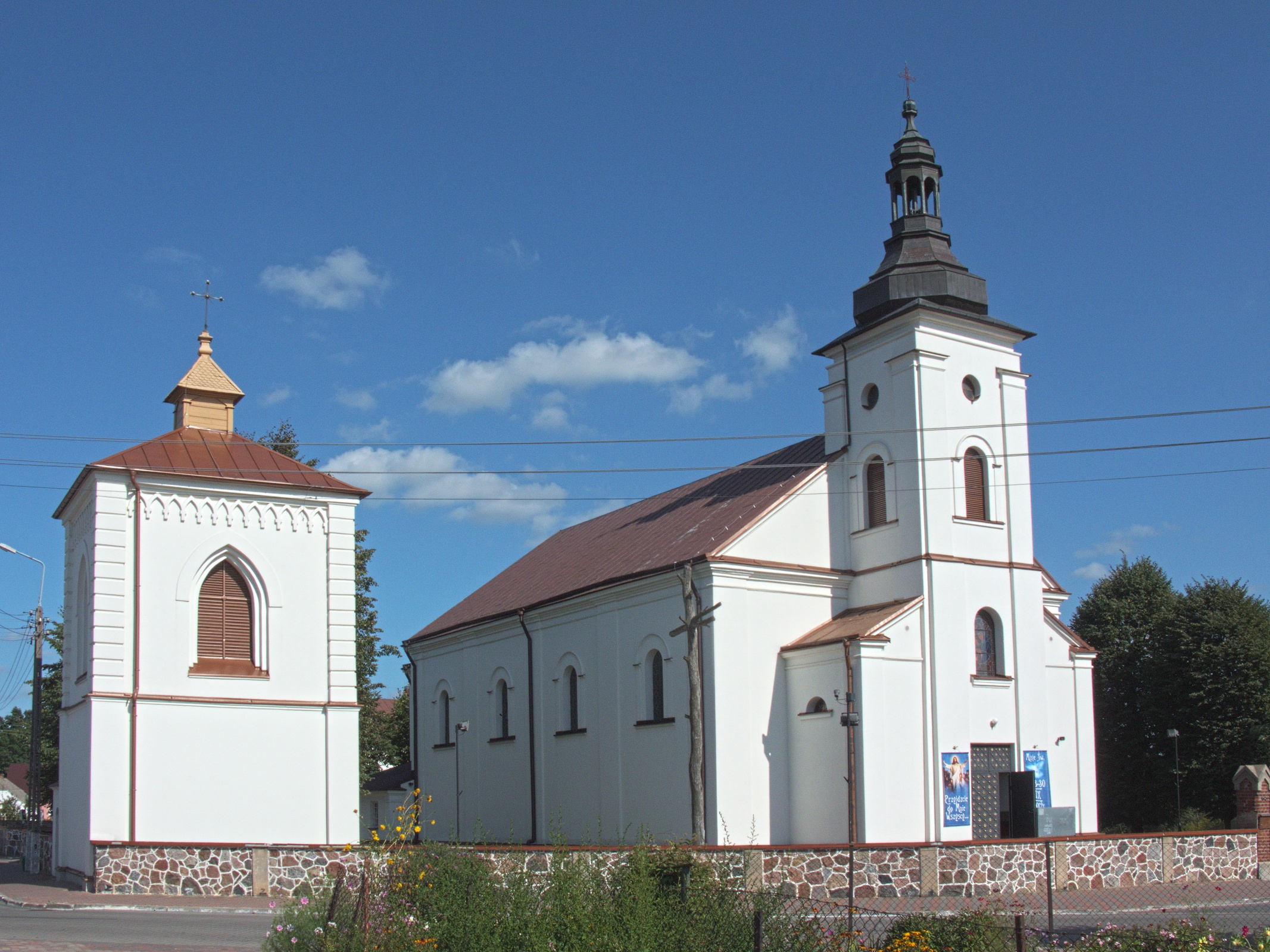 Kościół parafialny pw. Wniebowzięcia Najświętszej Maryi Panny w Brańsku.